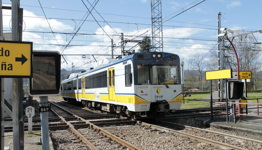 Tren de pasajeros de Renfe-Feve a su paso por la estación asturiana de El Berrón